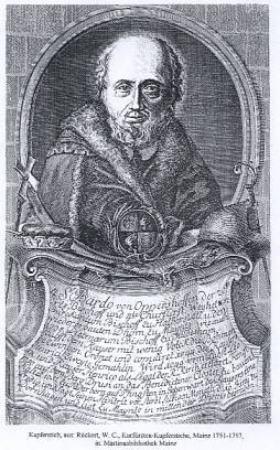 Bardo von Mainz. Kupferstich von W. C. Rückert. Erzbischof Bardo von Mainz. Kurfürsten-Kupferstiche, Mainz 1751-1757